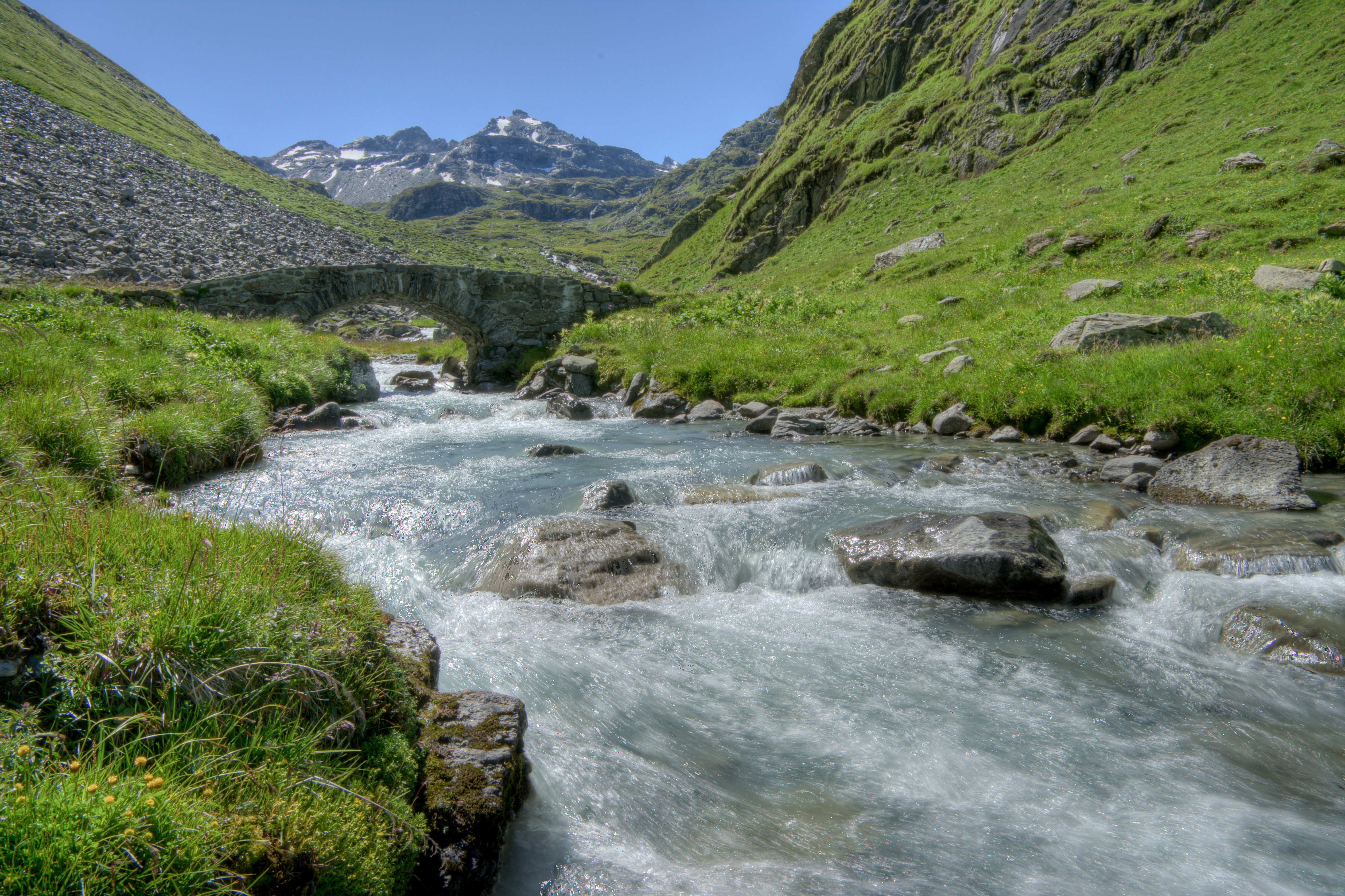 Printze river in val de Nendaz, Valais Switzerland